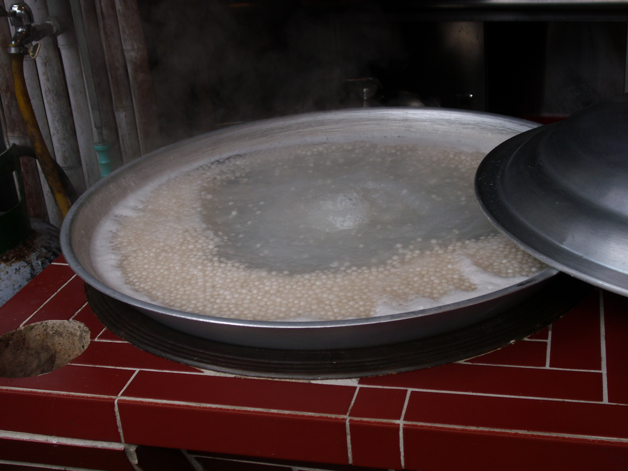 Bân-lâm-gú: 煮粉圓，行過臺灣苗栗南庄的一間店家，看著in咧煮粉圓，就共翕落來。